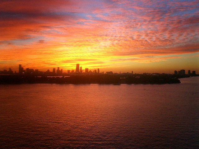 Digital photo taken by Marc Averette. Sunset over Miami 2004